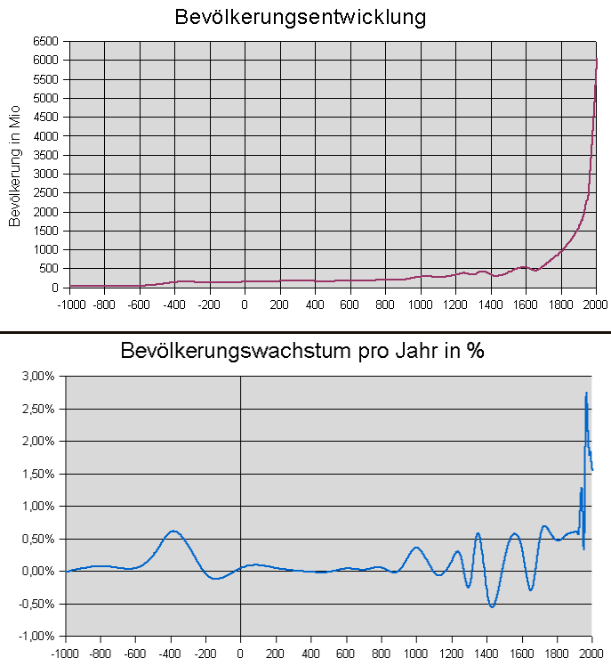 Entwicklung der Weltbevölkerung (Ersatz für :bild:World pop hist de 1.png, dem wohl die genaue Referenz fehlt.) Zahlenbasis: Jahr Bevölkerung in Millionen -10000 4 -1000 50 -750 60 -500 100 -400 162 -200 150 1 170 200 190 400 190 500 190 600 200 700 207 800 220 900 226 1000 310 1100 301 1200 360 1250 400 1300 360 1340 443 1400 350 1500 425 1600 545 1650 470 1700 600 1750 790 1800 980 1850 1.260 1900 1.650 1910 1.750 1920 1.860 1930 2.070 1940 2.300 1950 2.400 1960 3.020 1970 3.700 1974 4.000 1980 4.430 1987 5.000 1990 5.260 2000 6.070 2010 6.892 2014 7.238 2022 8.000 2031 9.000 (Werte für 2022 und 2031 extrapoliert aus Werten 2000-2014)